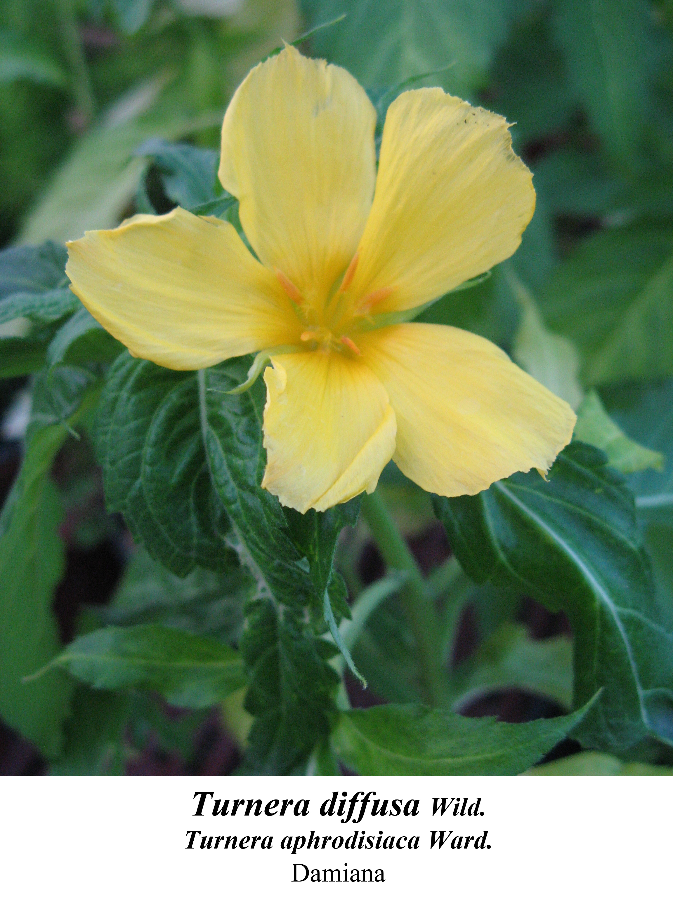 planta medicinal